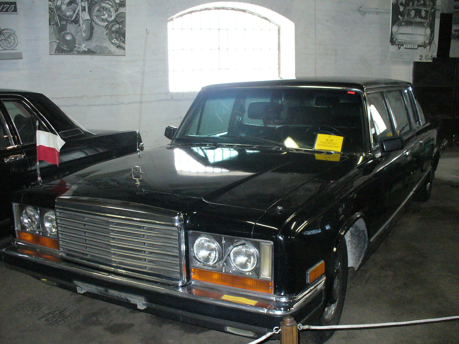 Zil-4104 (115) (ЗиЛ-4104). Muzeum Dopravy Bratislava